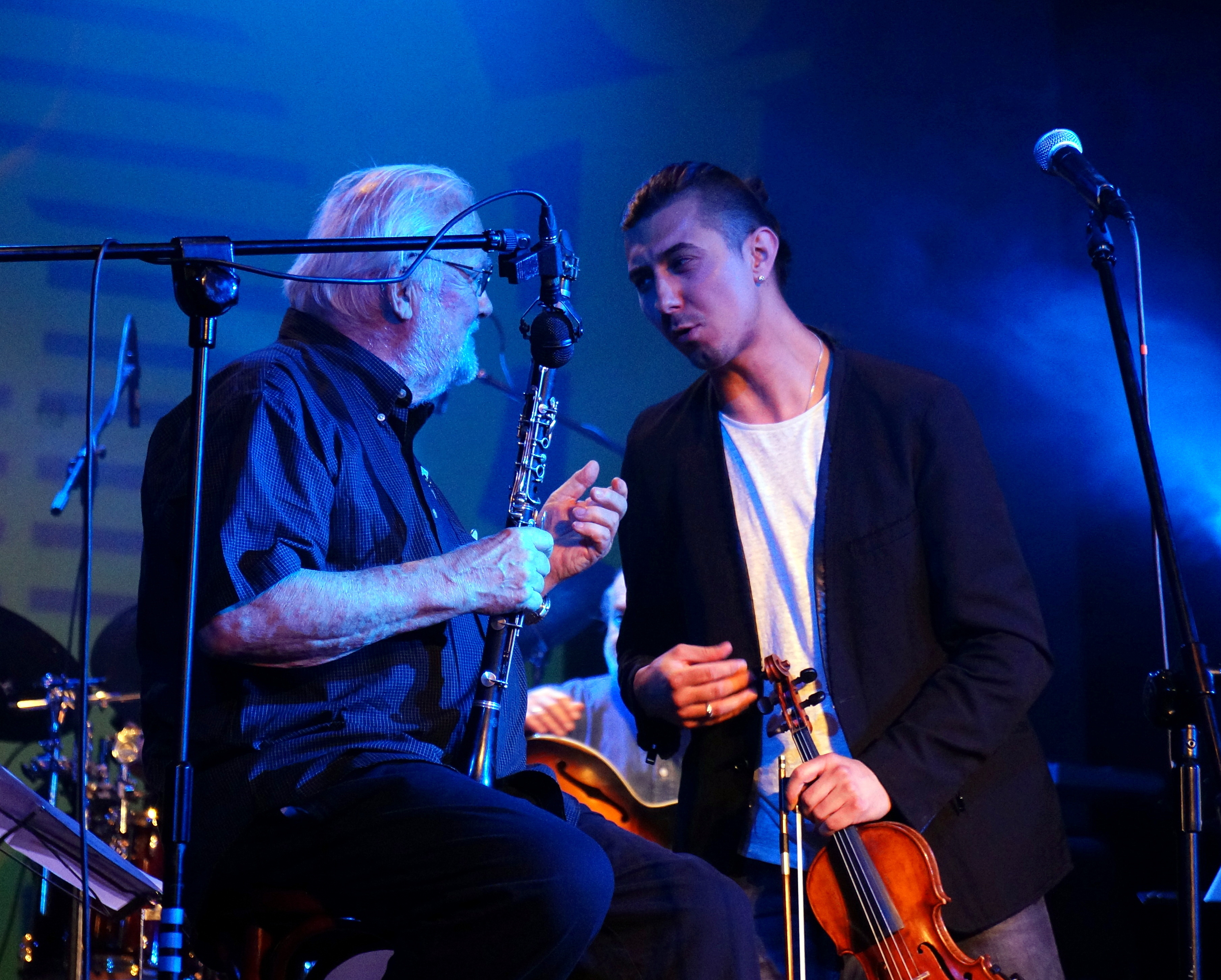 Gorzów Wlkp., 30 lat Małej Akademii Jazzu. Koncert okolicznościowy na deskach Teatru im Juliusza Osterwy. Na zdjęciu z Bradem Terrym.